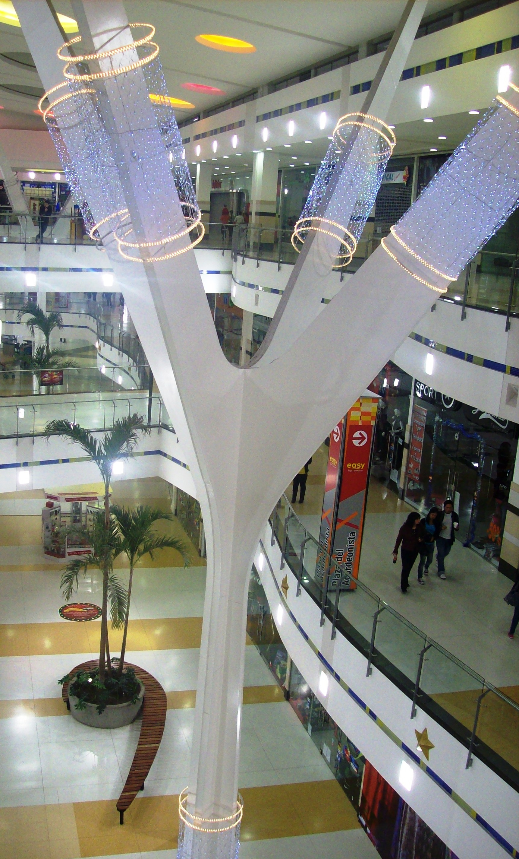 Elemento estructural del centro comercial Centro Mayor